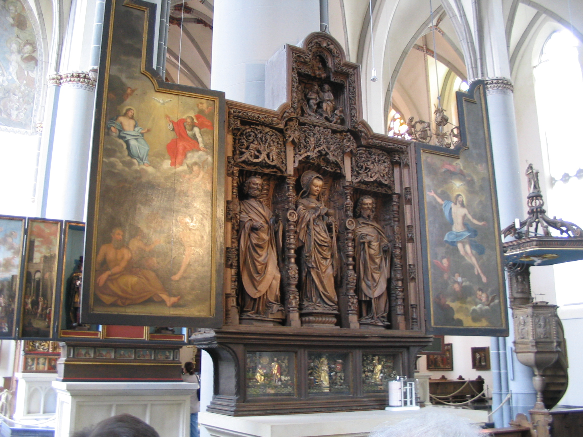 Dreifaltigkeitsaltar von St. Nicolai, Kalkar